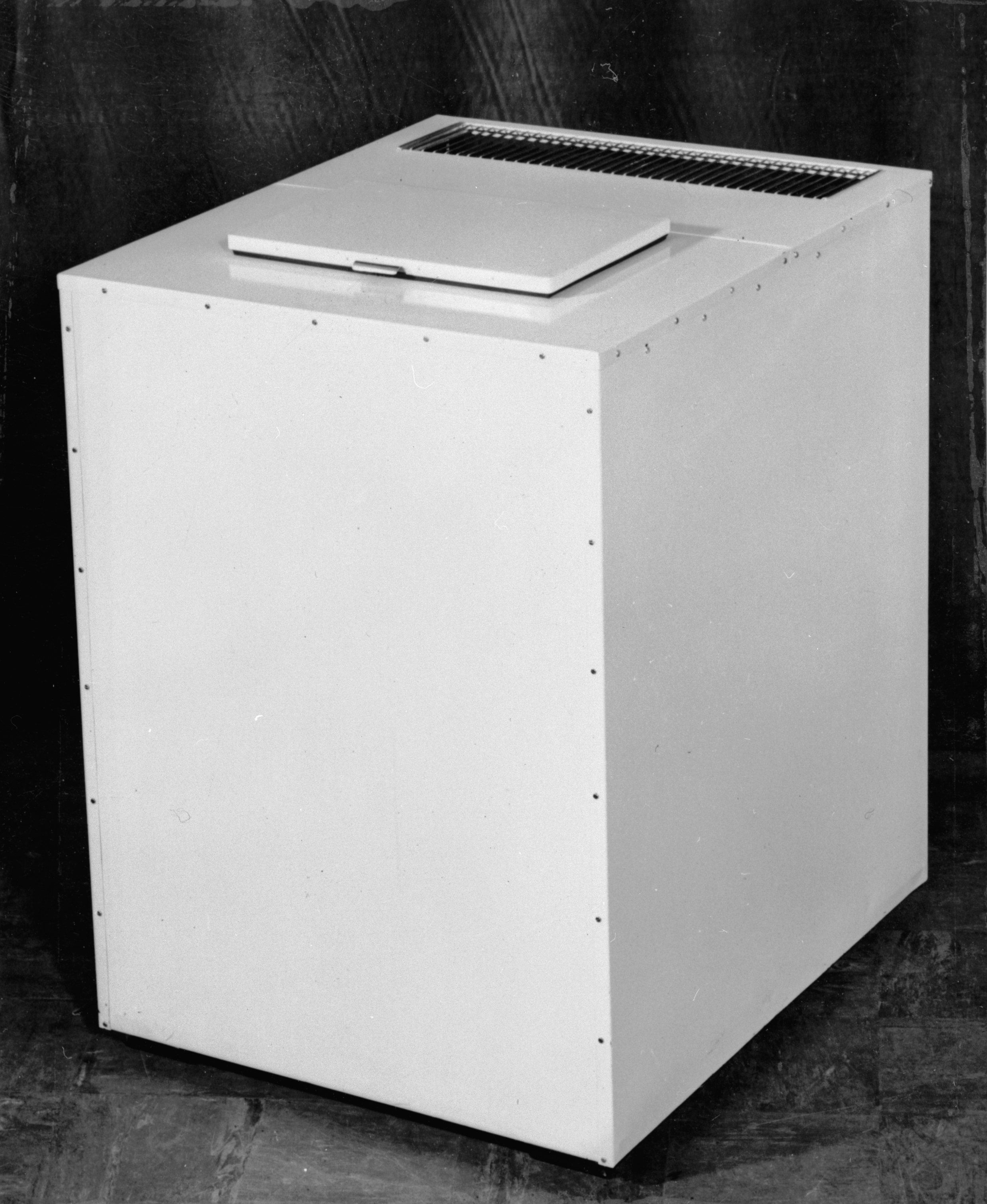 Frysbox C90. Förslag till 90 liters.